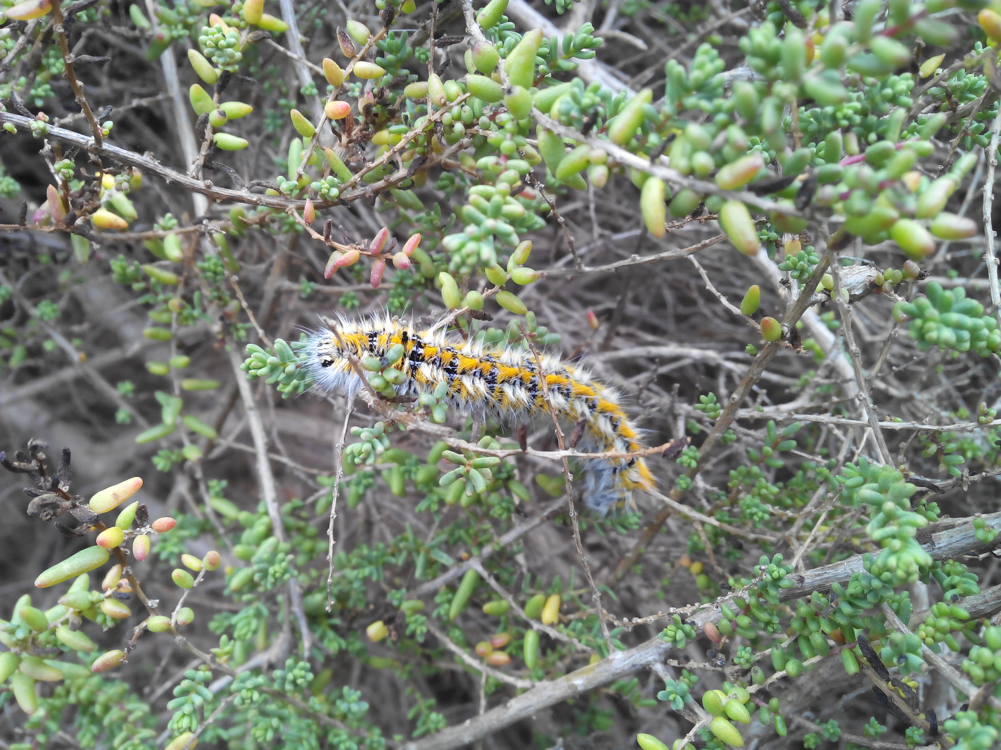 Lasiocampa serrula.